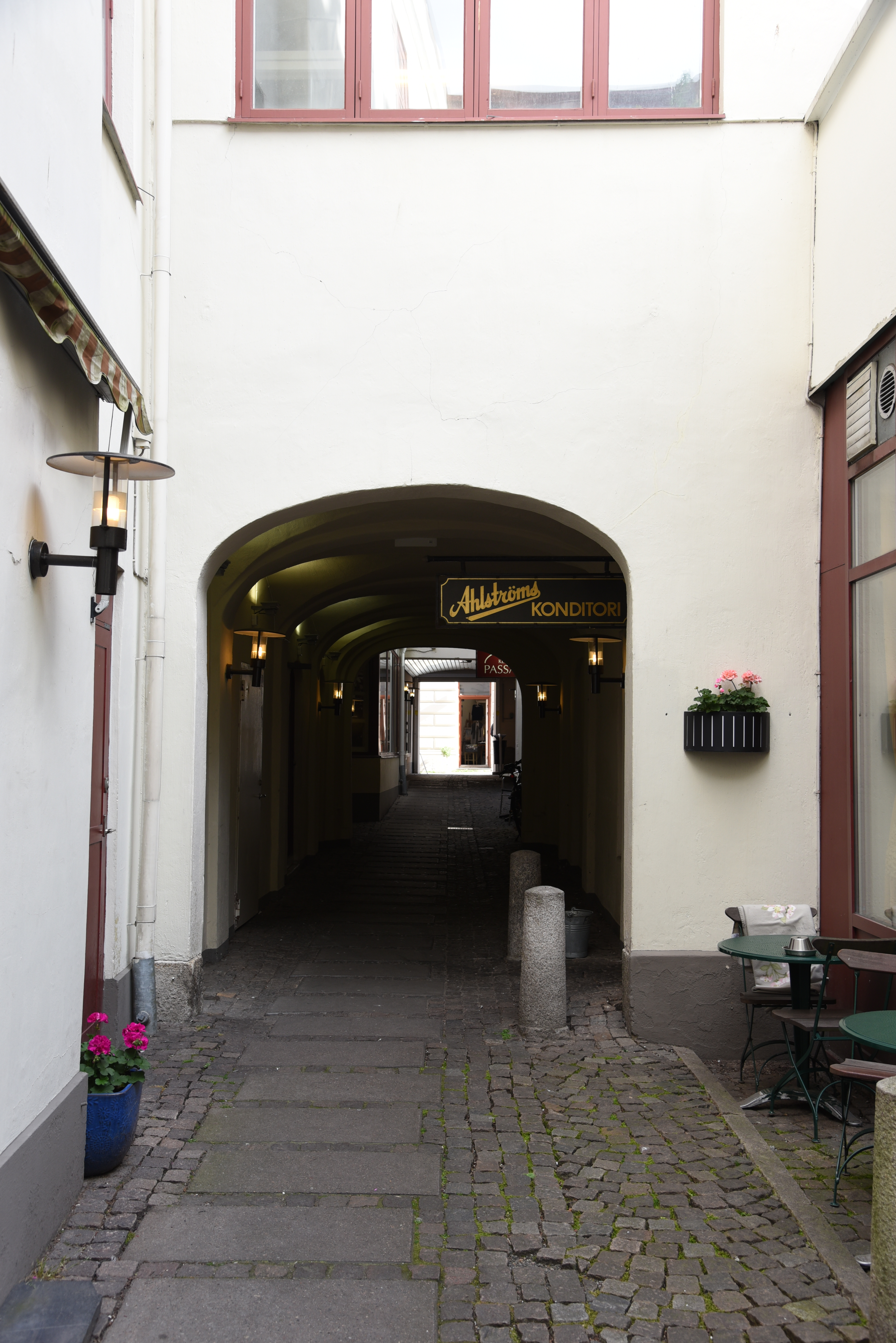 Åkermanska huset i 15 kvarteret Frimuraren i stadsdelen Inom Vallgraven i Göteborg. Gården och passagen mot Drottninggatan 26.